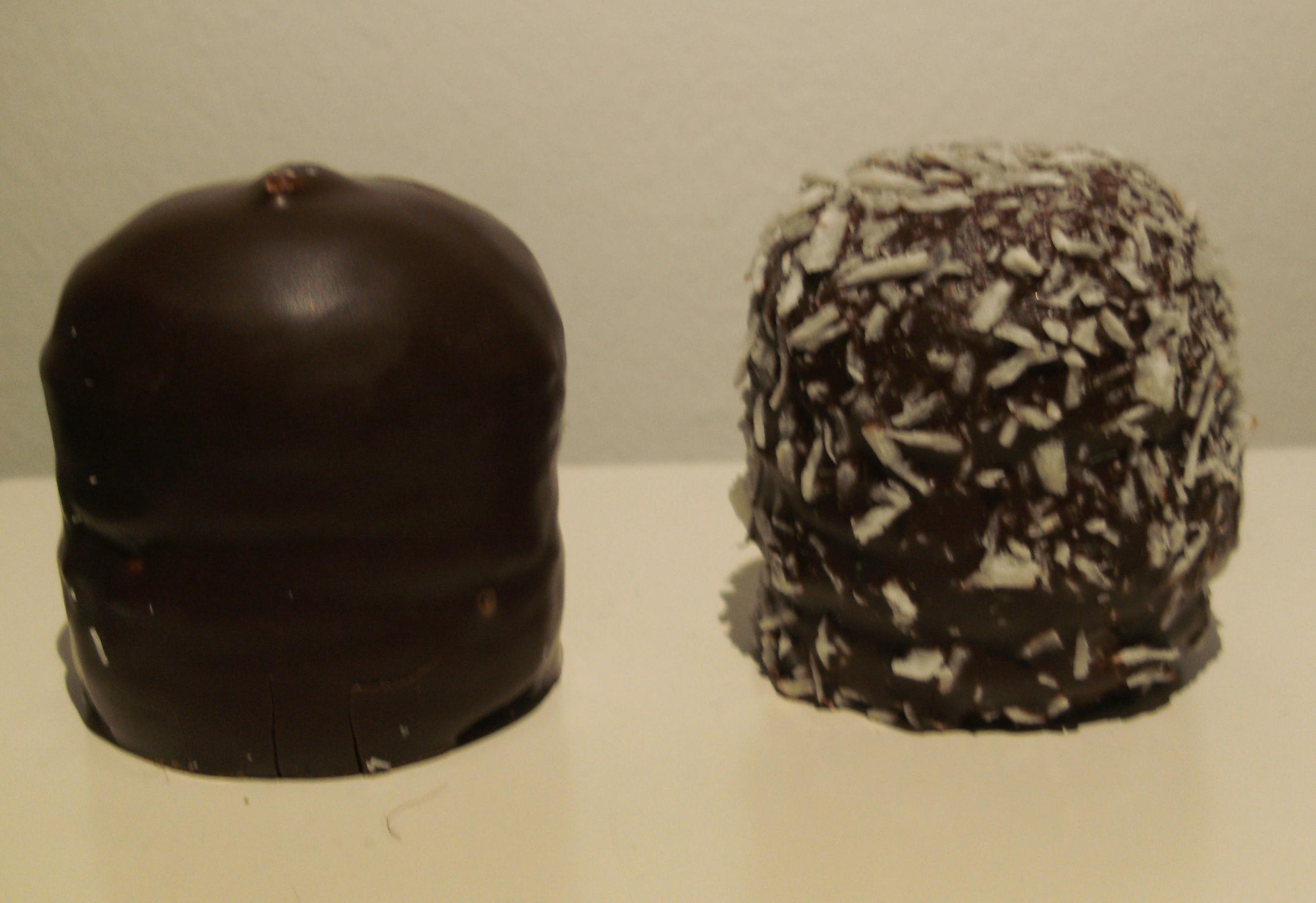 Schwedenbomben Schokoküsse